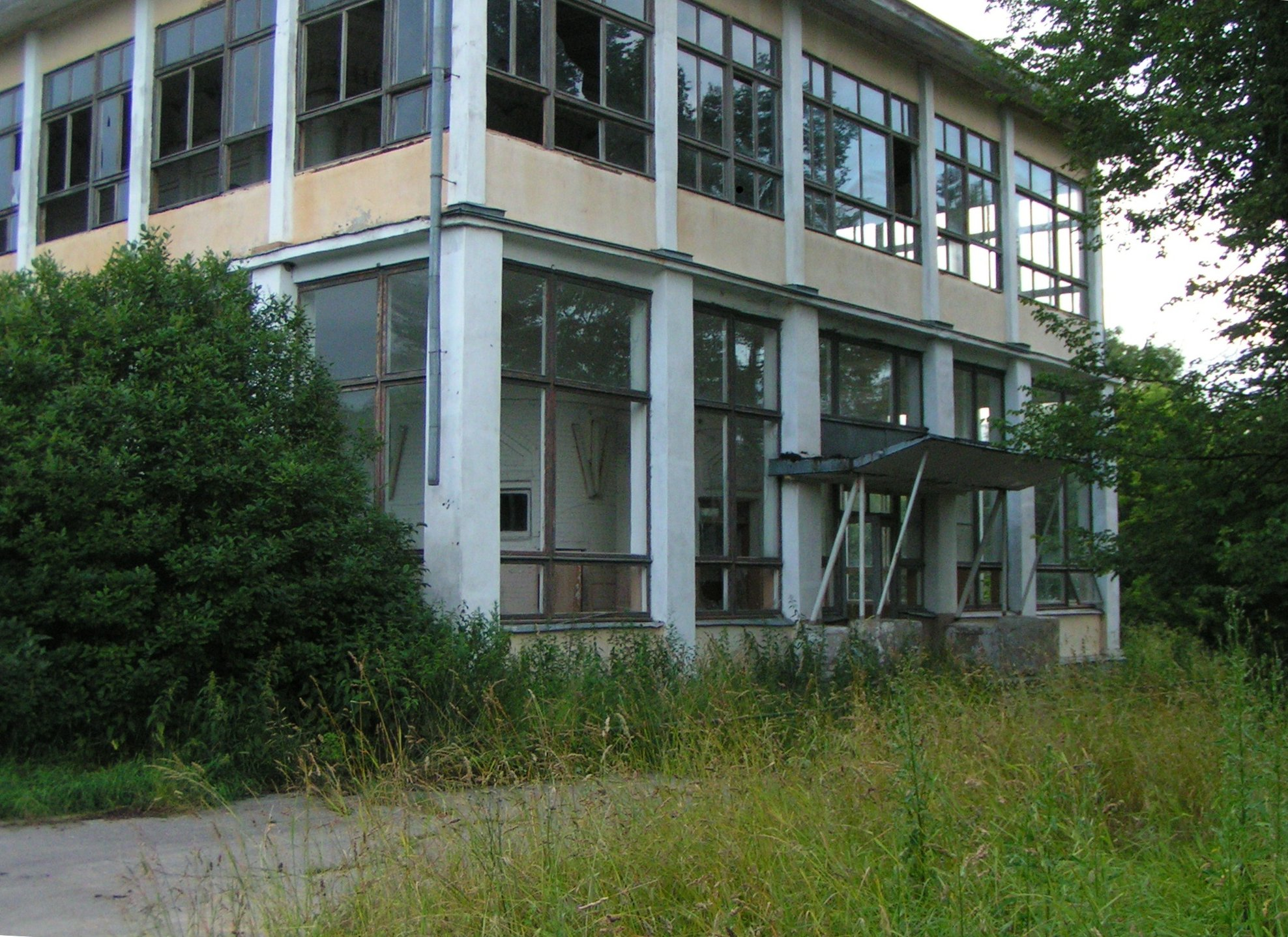 Столовая пионерского лагеря. Сквозь окна видны стены храма Николая Чудотворца (Троицкий Александро-Невский женский монастырь). Село Акатово Клинского района Московской области.